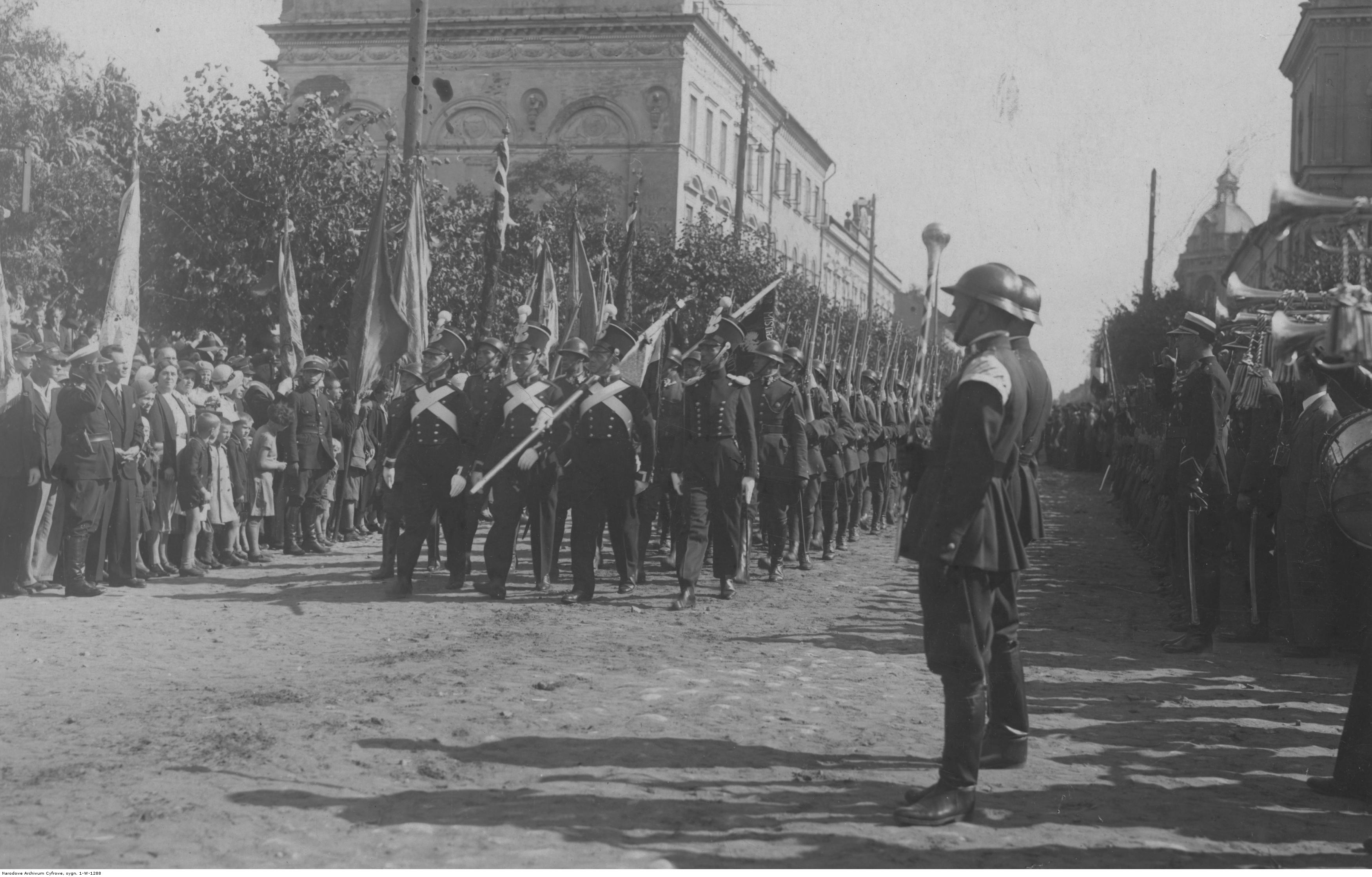 Święto 72 pułku piechoty w Radomiu; październik 1932 r. Defilada, na czele której maszerują czterej żołnierze w historycznych mundurach. Koncern Ilustrowany Kurier Codzienny - Archiwum Ilustracji. Sygnatura: 1-W-1288